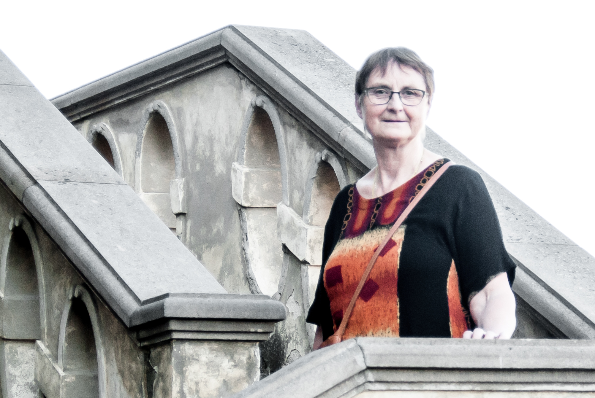 Mireia Ryskova